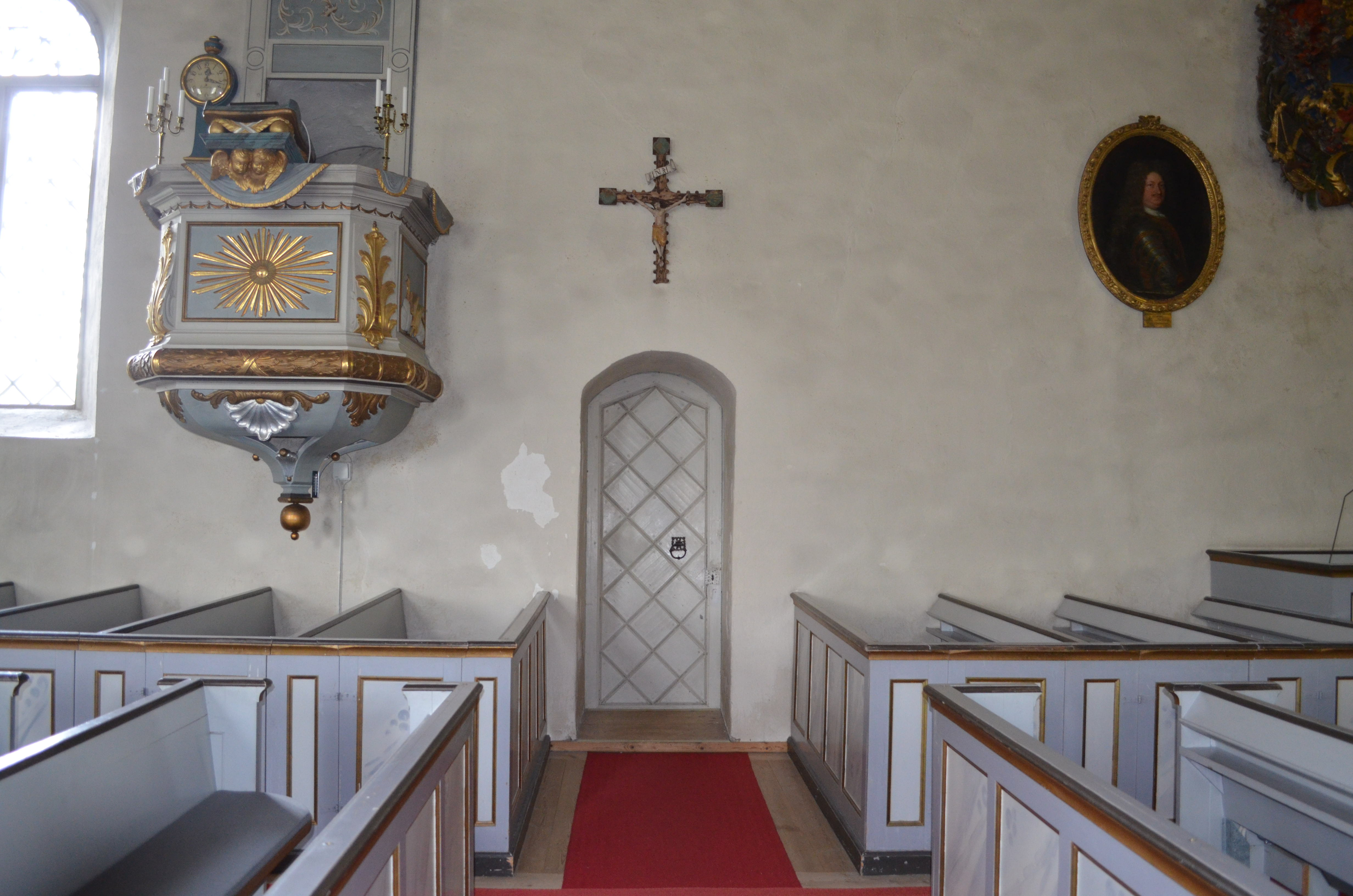 Norra Vi kyrka